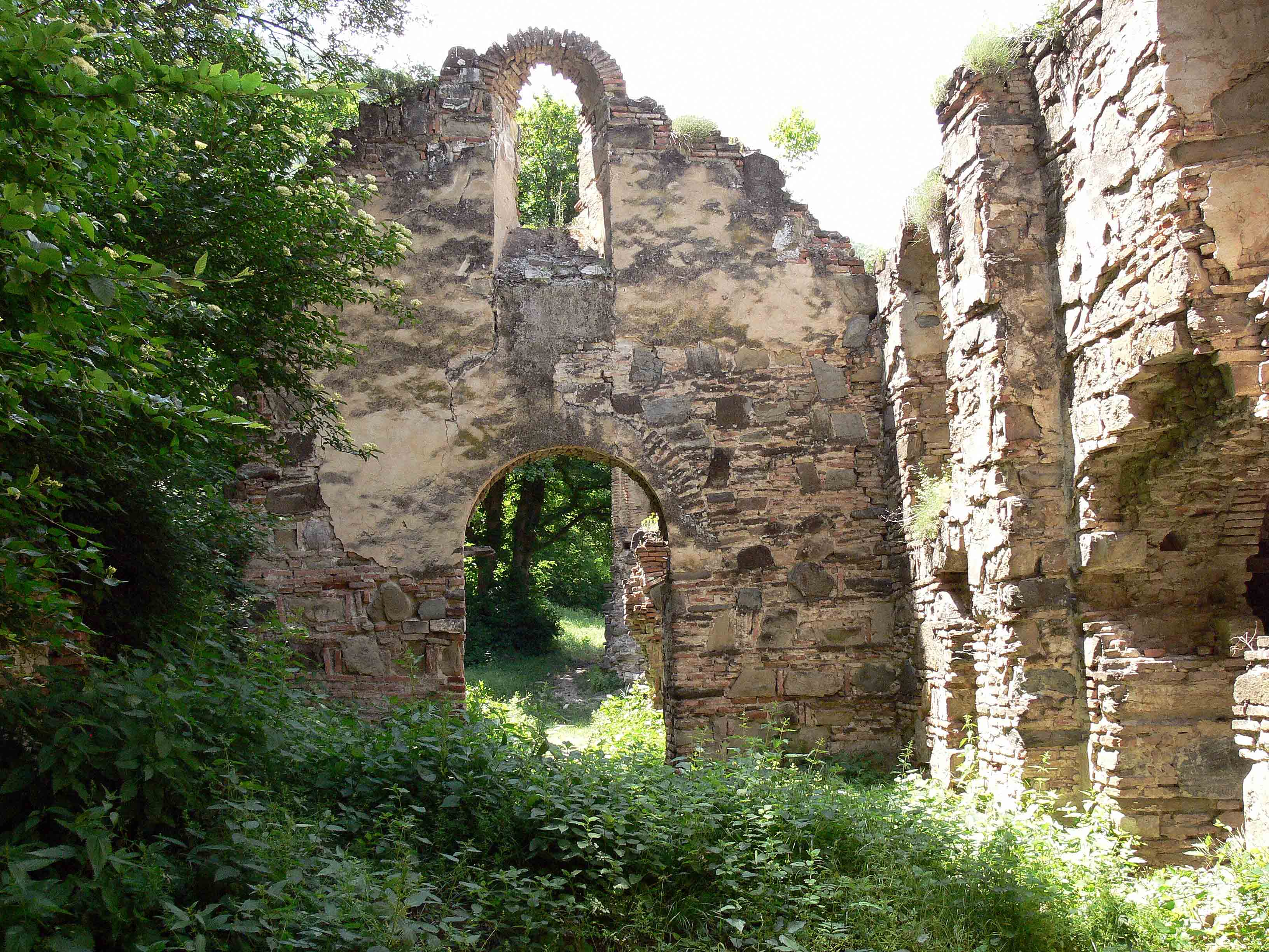 Armazi ruins